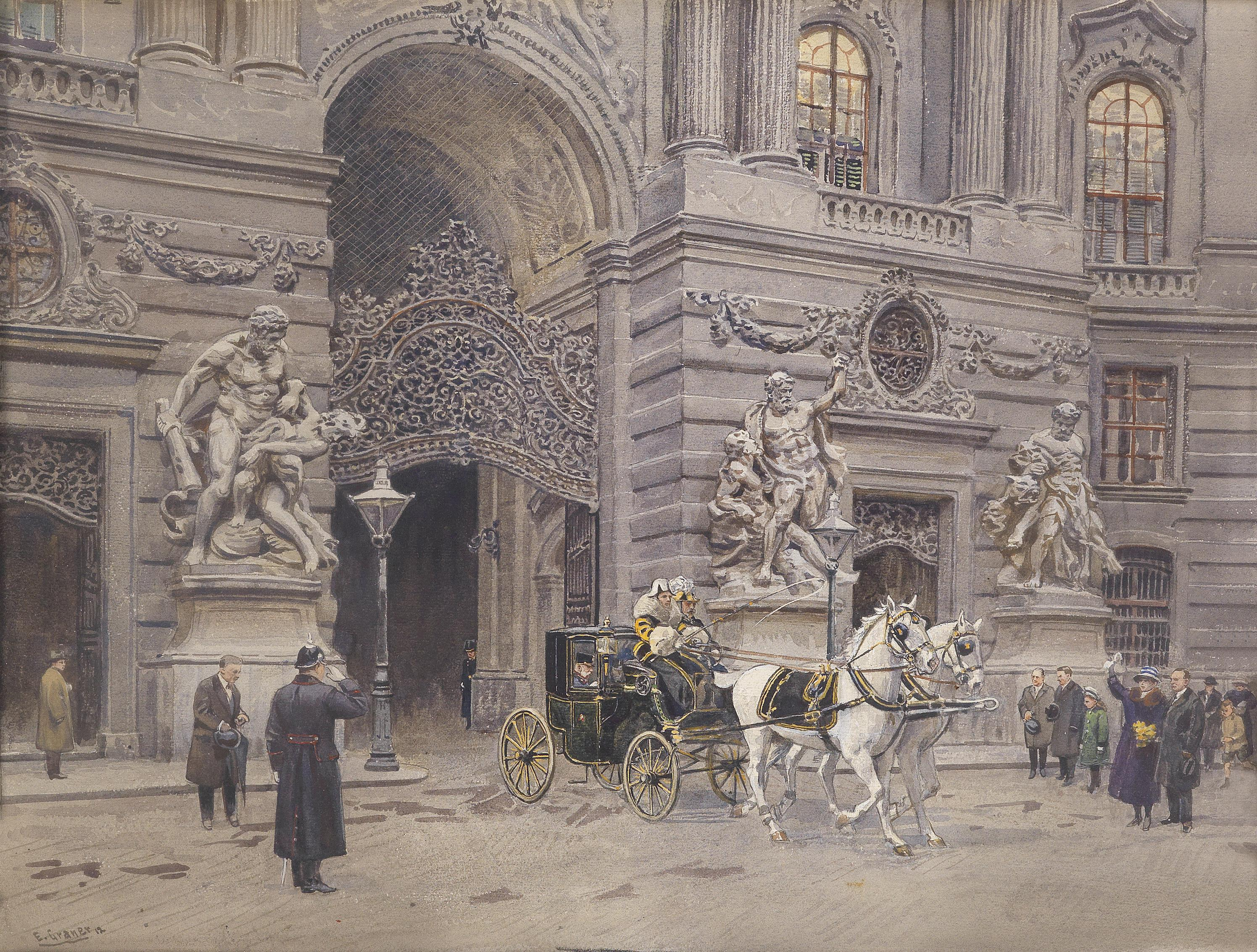 Kaiser Franz Joseph in seiner Kutsche aus der Burg kommend